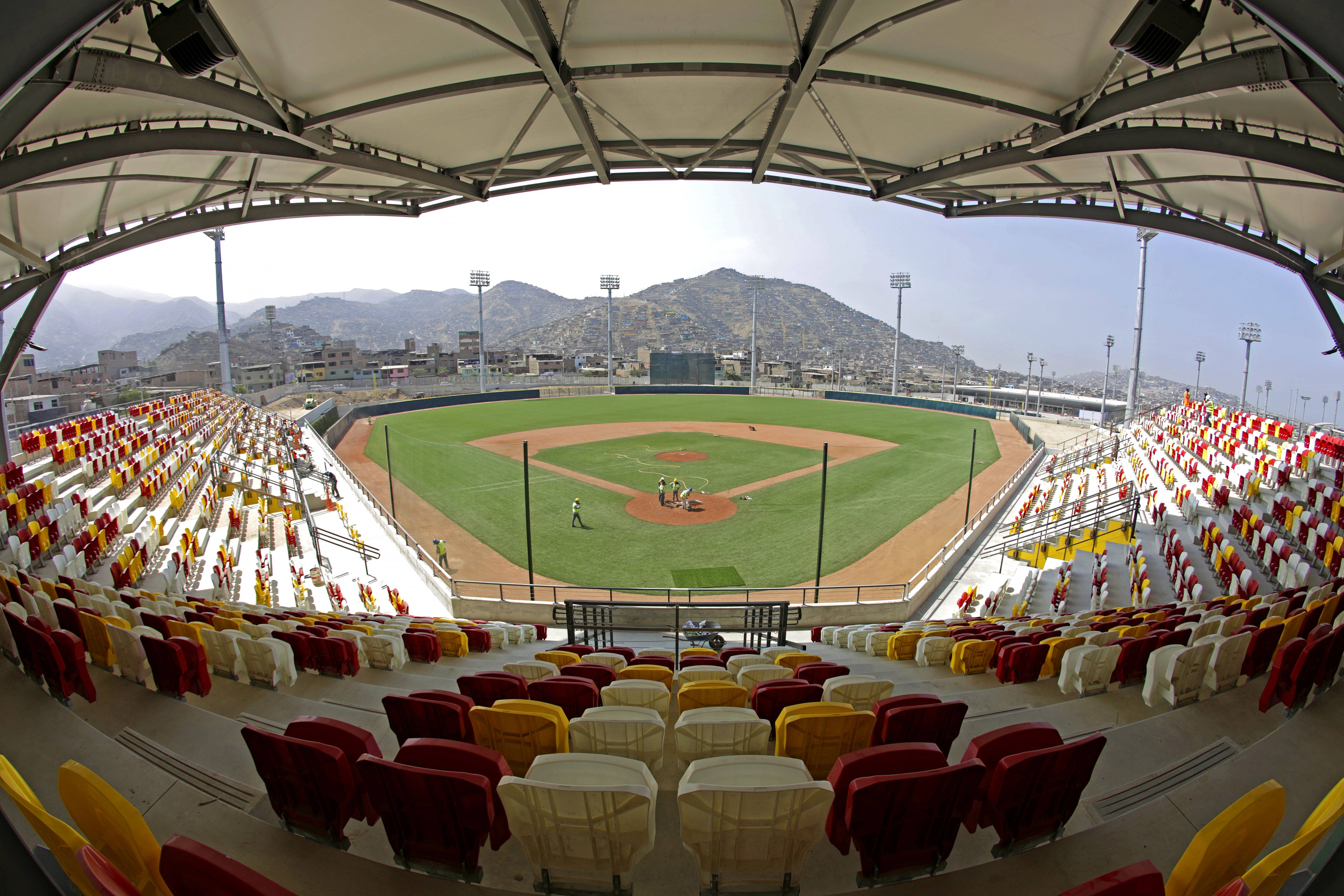 Sede de los Juegos Panamericanos y Parapanamericanos de 2019